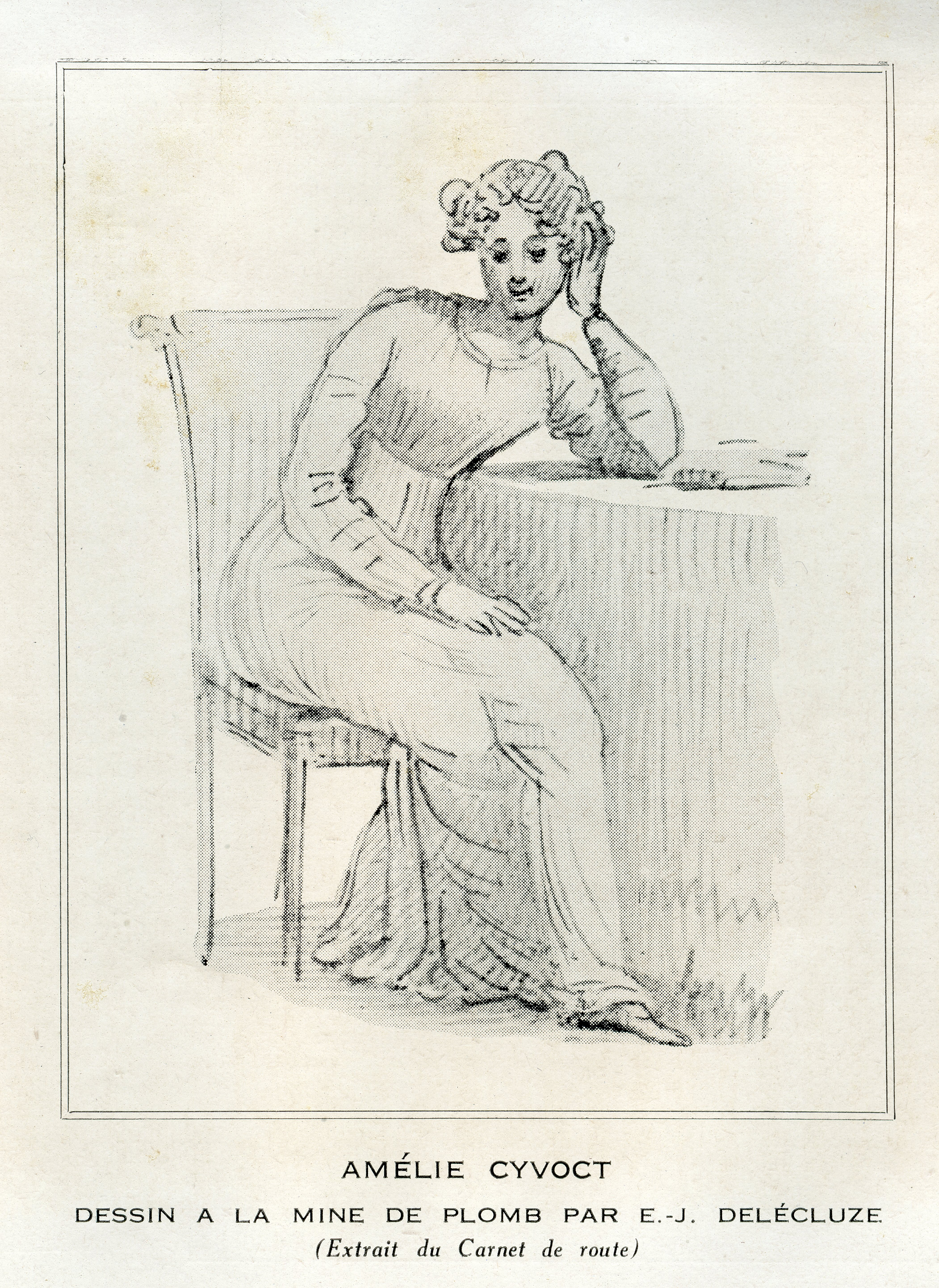 Dessin d'Etienne-Jean Delécluze, terminé le 8 avril 1824